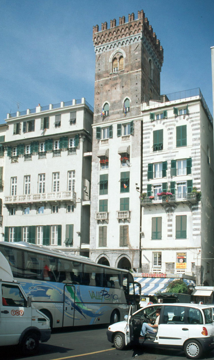 Genua 2004